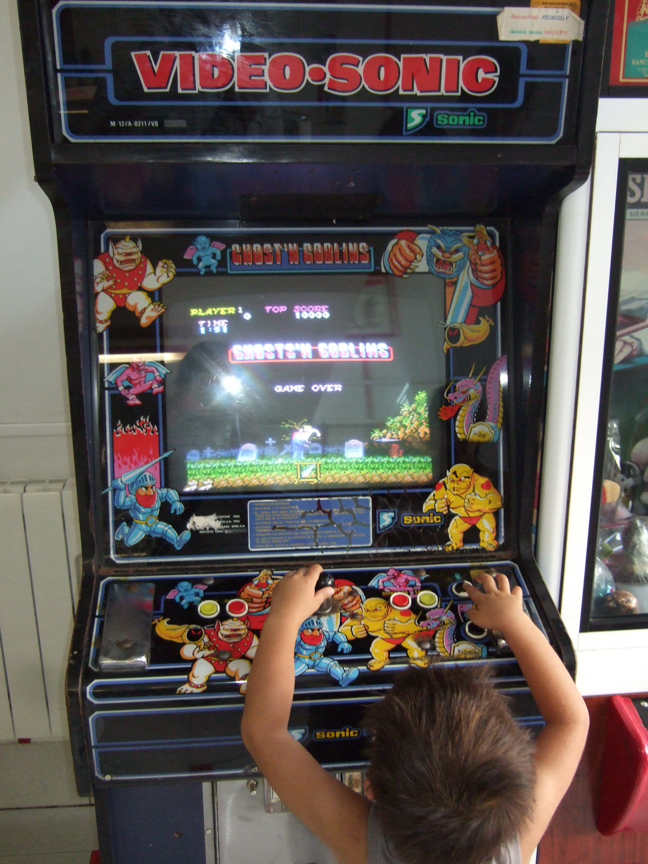 niño jugando al ghosts'n goblins en Cuenca